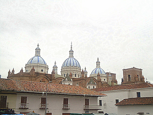 Vista de las cúpulas de la catedral de la Inmaculada Concepción en Cuenca, Ecuador.